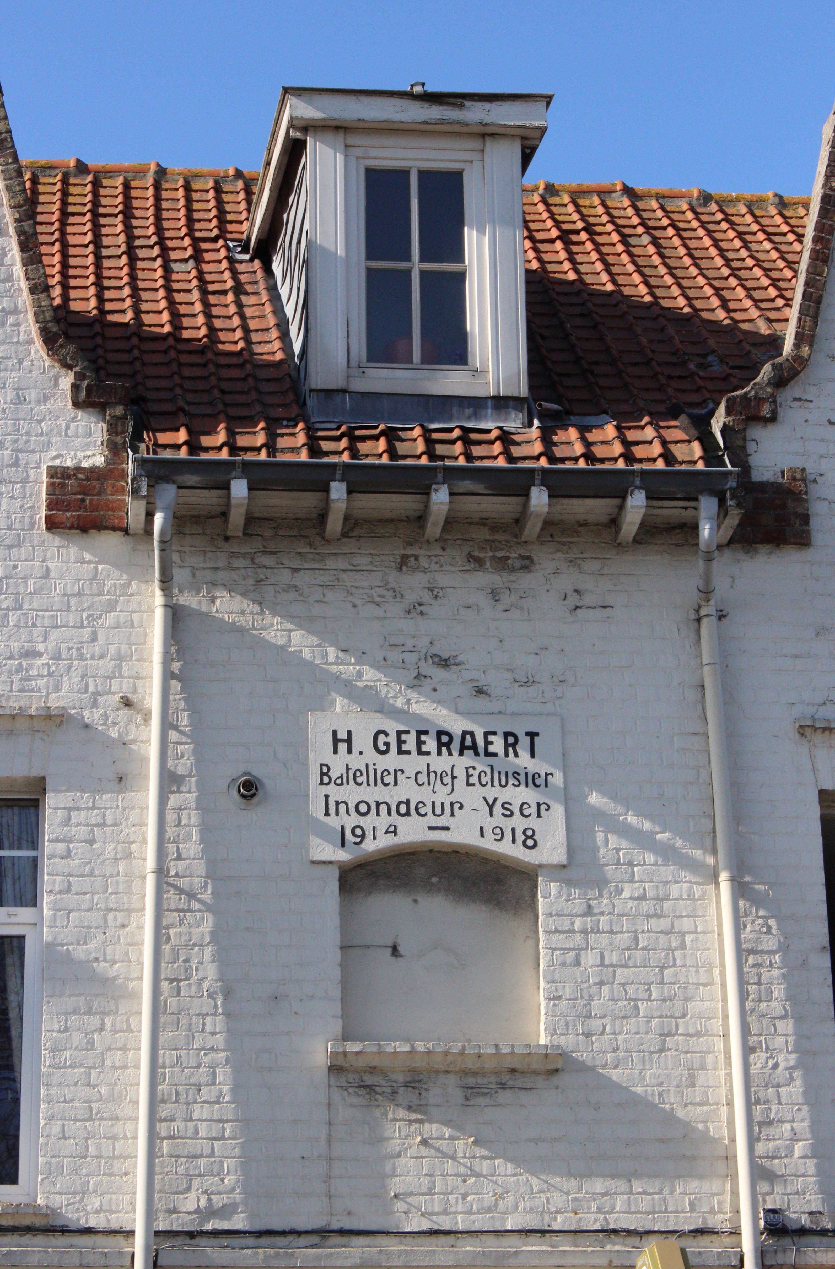 Gedenkplaat ter herinnering aan Hendrik Geeraert. Nieuwpoort, West-Vlaanderen, België. Pieter Deswartelaan 3